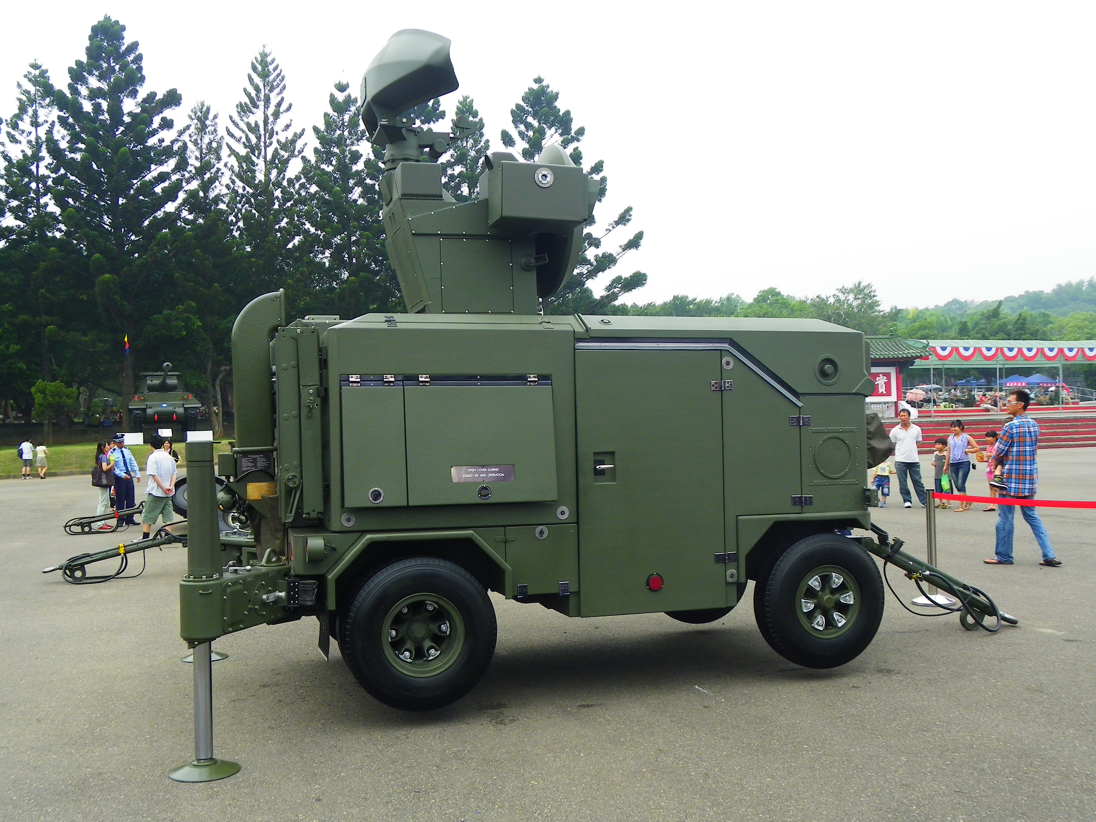 中華民國空軍天兵防空系統的天兵射控雷達，攝於2011年成功嶺營區開放活動。